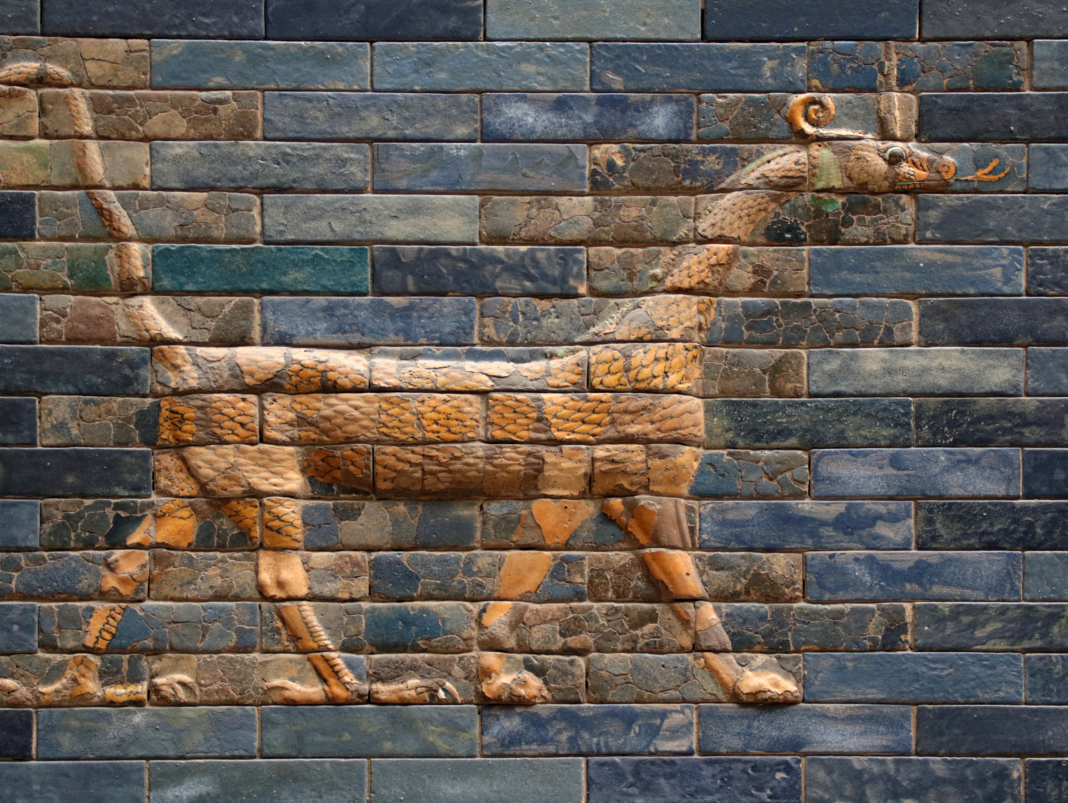 Mushkhusshu, il drago-serpente raffigurato sulla porta di Ishtar - Pergamon Museum, Berlin